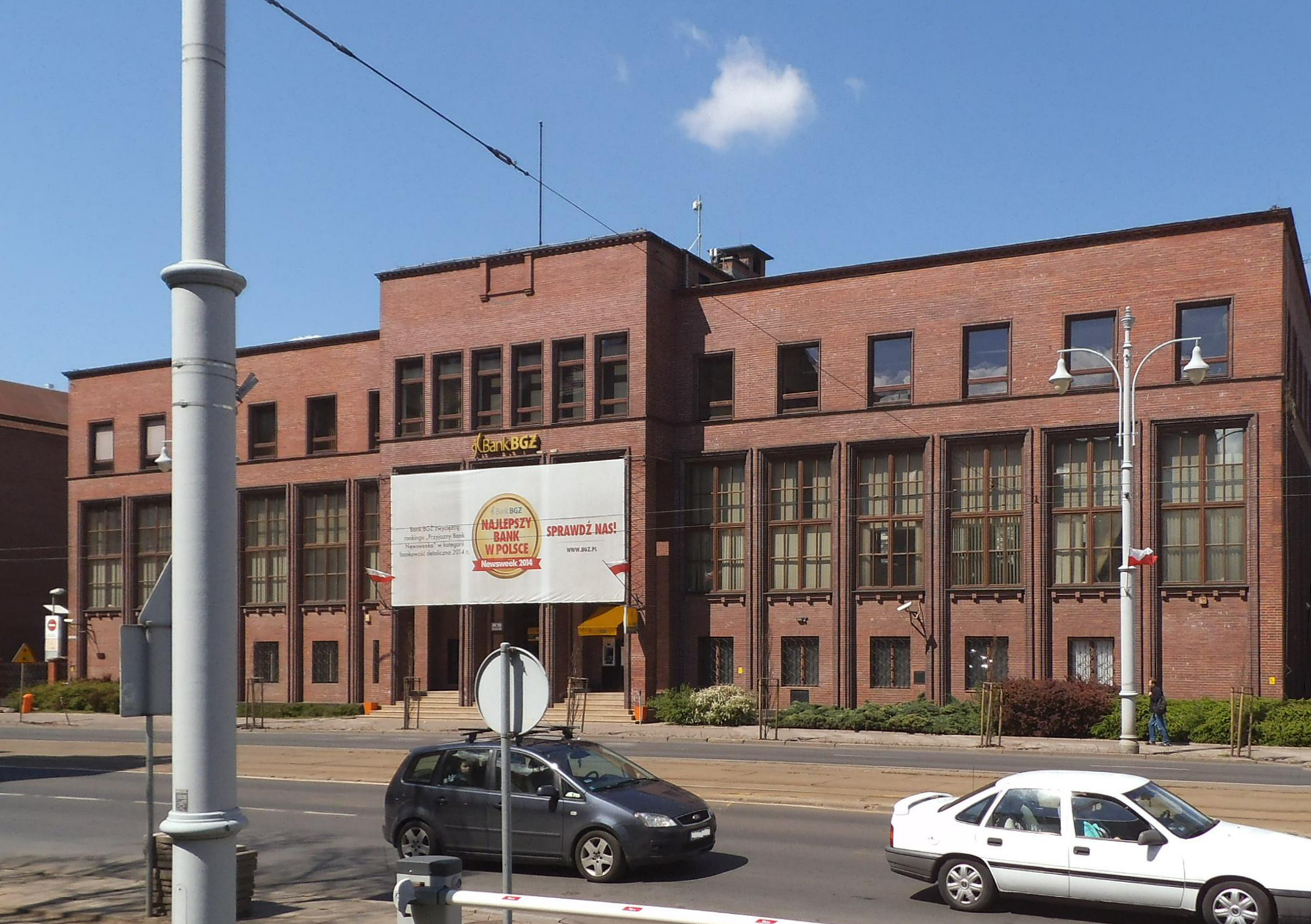 Bank Toruń